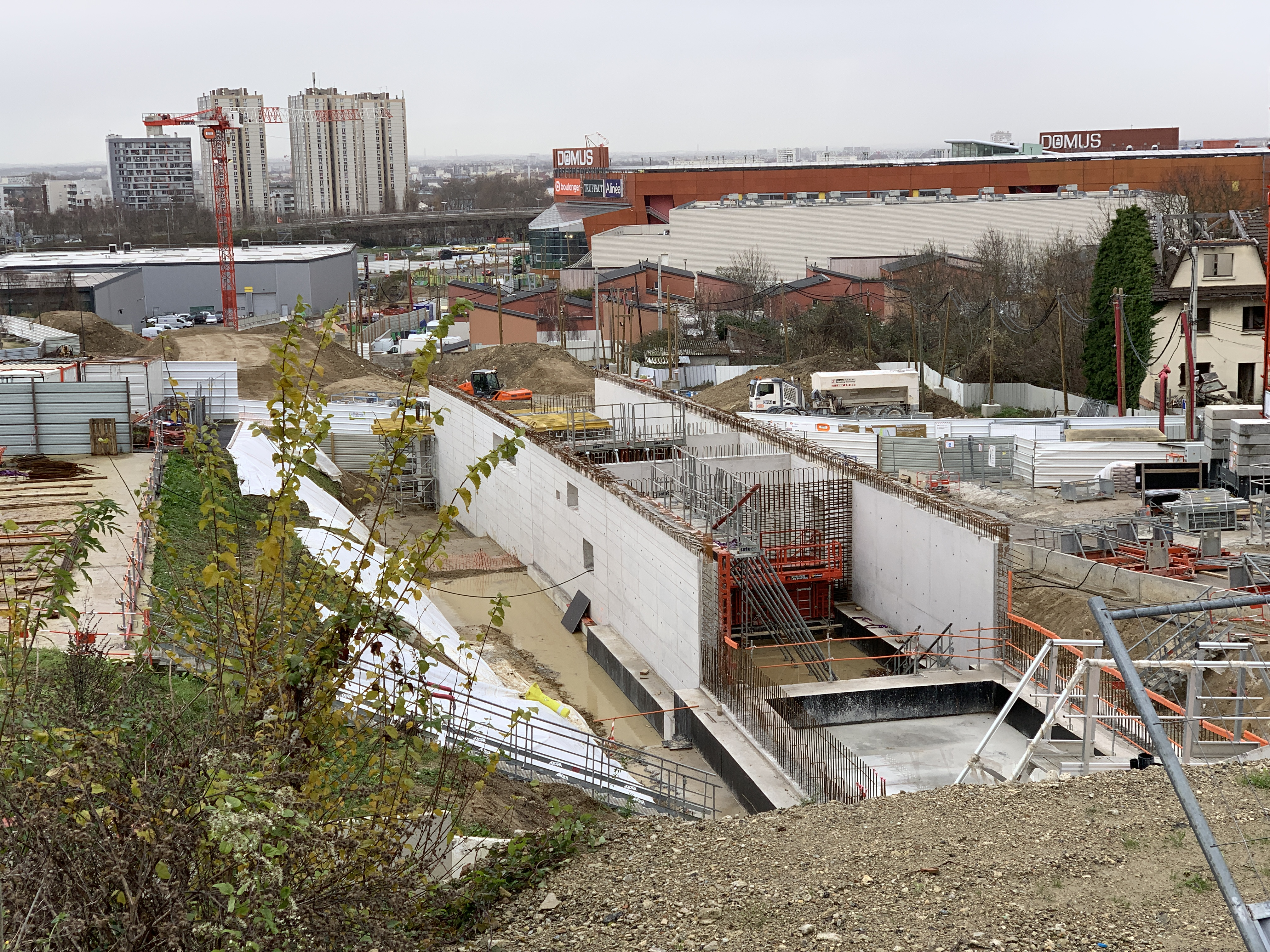 Chantier de construction la ligne 11 du métro de Paris entre les stations Coteaux-Beauclair et La Dhuys au nord du boulevard Gabriel Péri, Rosny-sous-Bois.